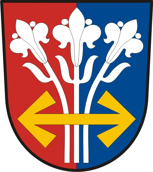 Starkoč